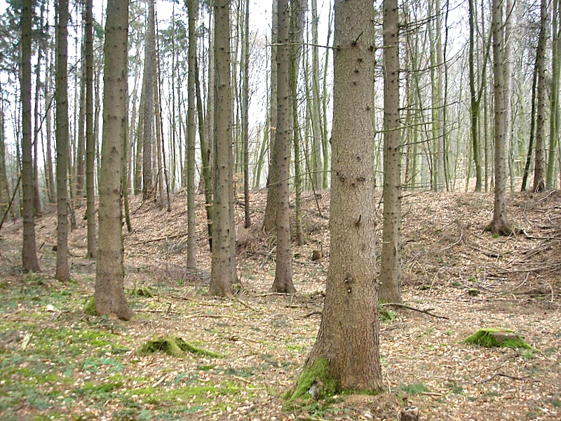 Frühmittelalterliche Schanze Wagesenberg bei Pöttmes (Landkreis Aichach-Friedberg, Bayerisch-Schwaben). Der Randwall vor dem Halsgraben der Hauptburg. Eigene Aufnahme, März 2008 / Early Middle Ages hillfort Wagesenberg near Poettmes (Landkreis Aichach-Friedberg, Bavaria, Germany). Earthworks in front of the moat of the central castle. Own photo, March 2008